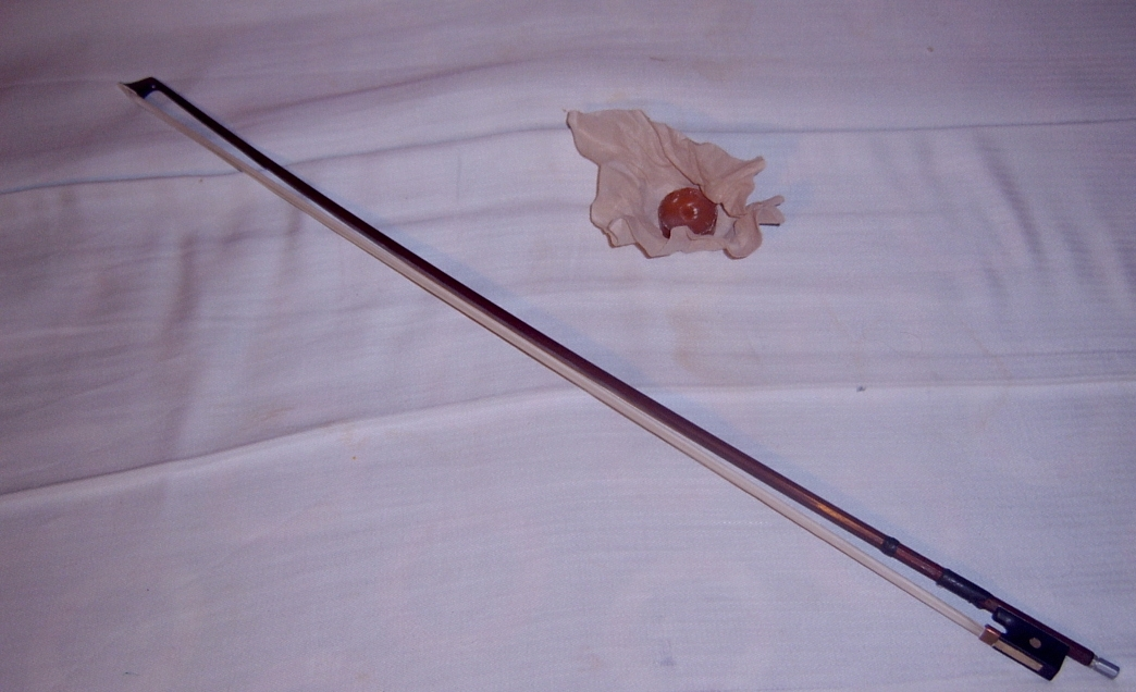 Hegedűvonó